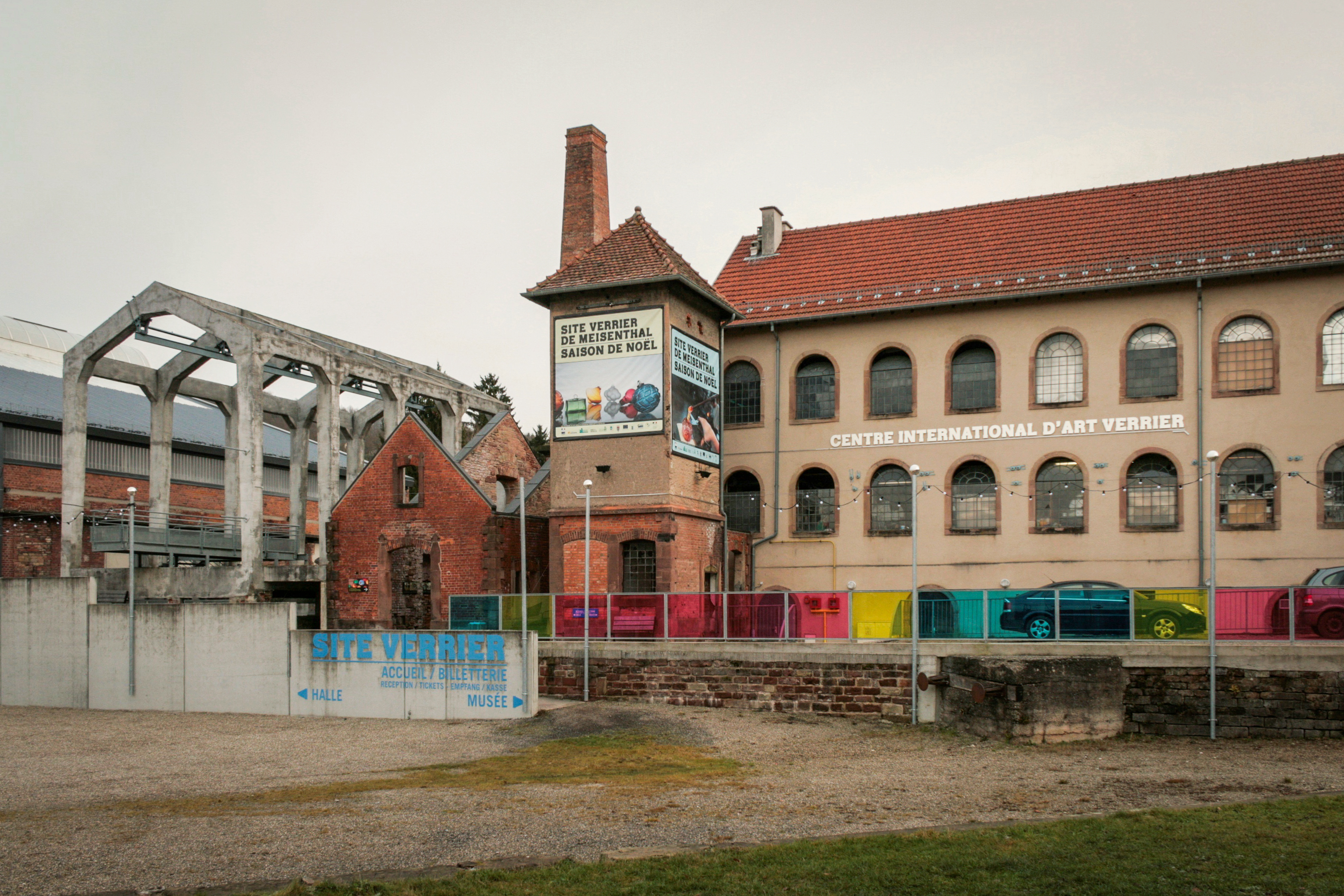 Meisenthal Site international d'art verrier 01